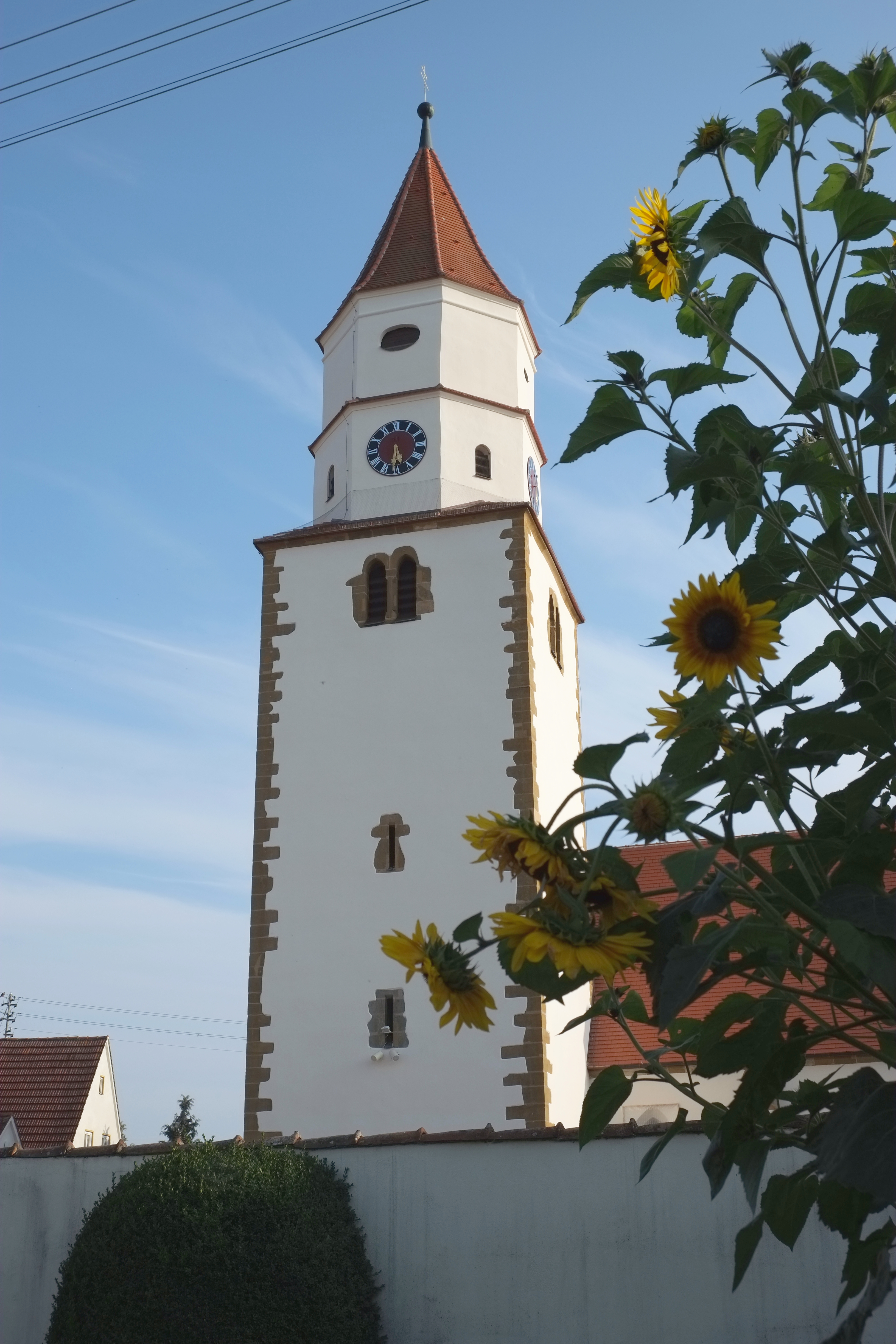 Katholische Pfarrkirche St. Vitus in Birkhausen, einem Ortsteil von Wallerstein im Landkreis Donau-Ries (Bayern, Deutschland)